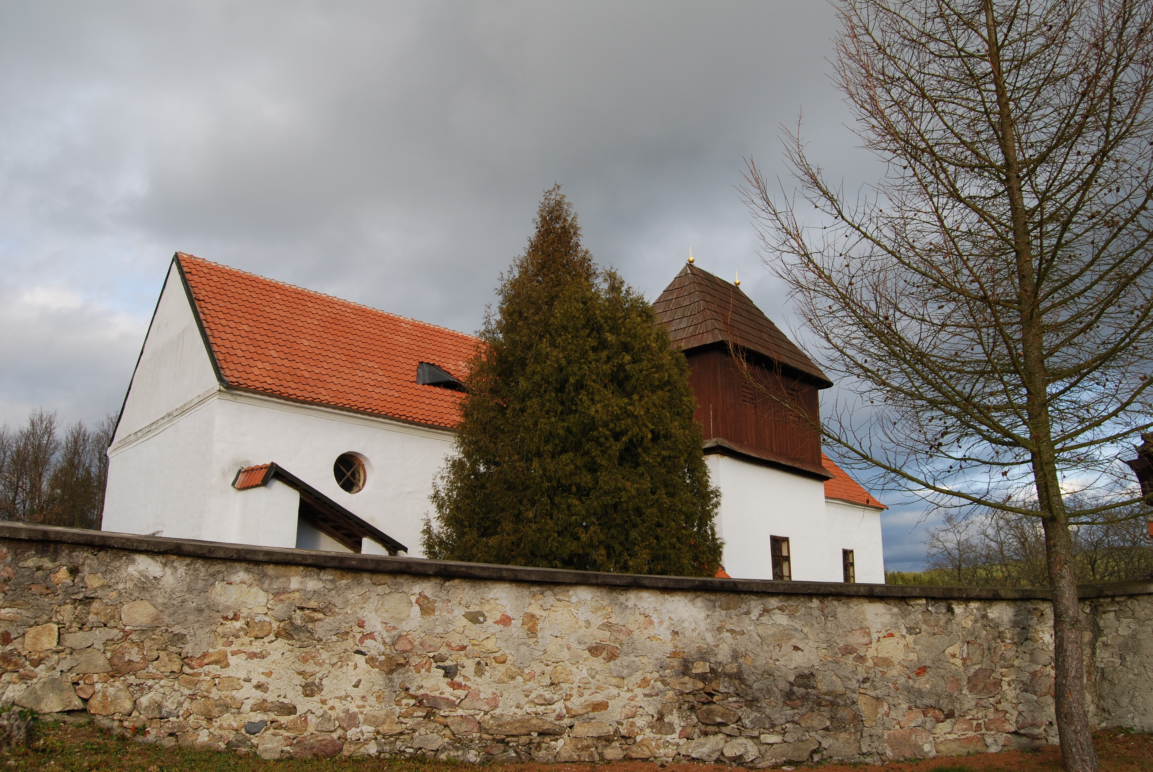 Chřešťovice. Kostel sv. Jana Křtitele z 13 století. Chřešťovice je vesnice, část obce Albrechtice nad Vltavou v okrese Písek. Česká republika.